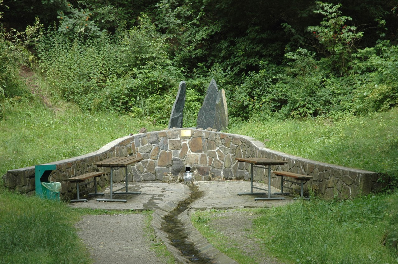 Pramen Židlo v Bělé (okres Opava)